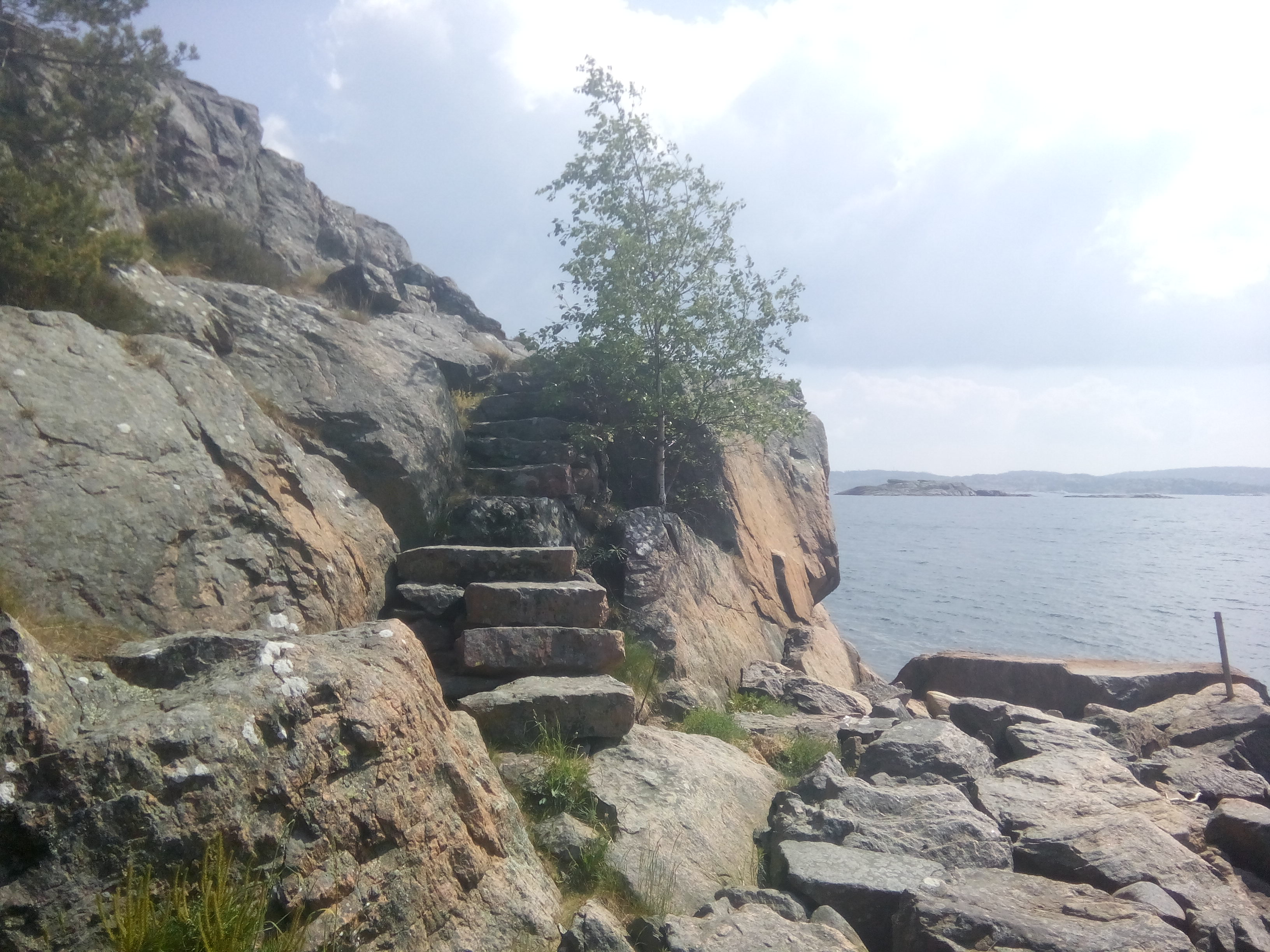 Stentrappa i Råssö naturreservat på Orust.